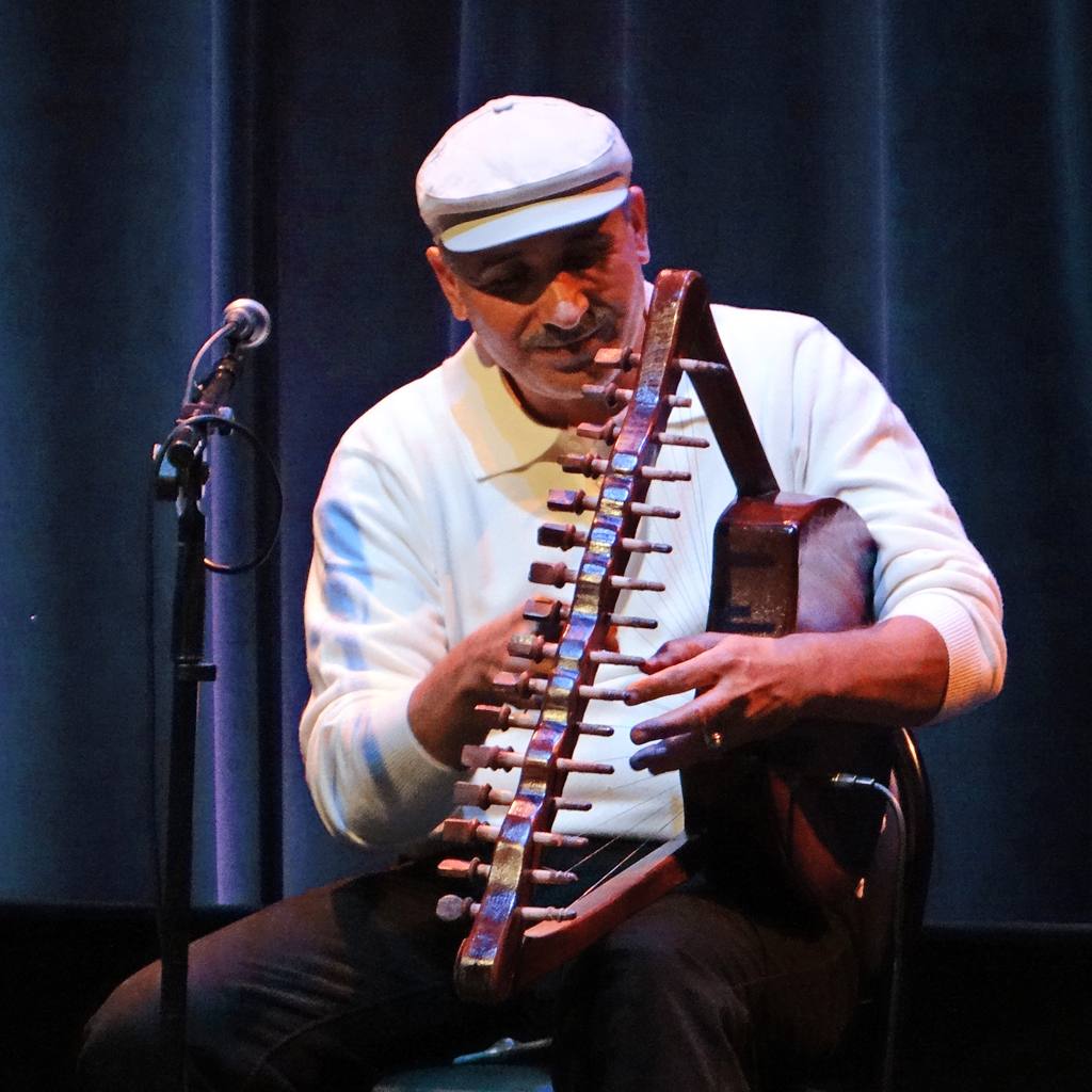 Joueur de Simsimiyya (lyre égyptienne) et soliste principal. Musicien de l'orchestre "El Tanbura" de Port-Saïd en Egypte en concert à l'Institut du Monde Arabe (IMA), samedi 1er décembre 2012